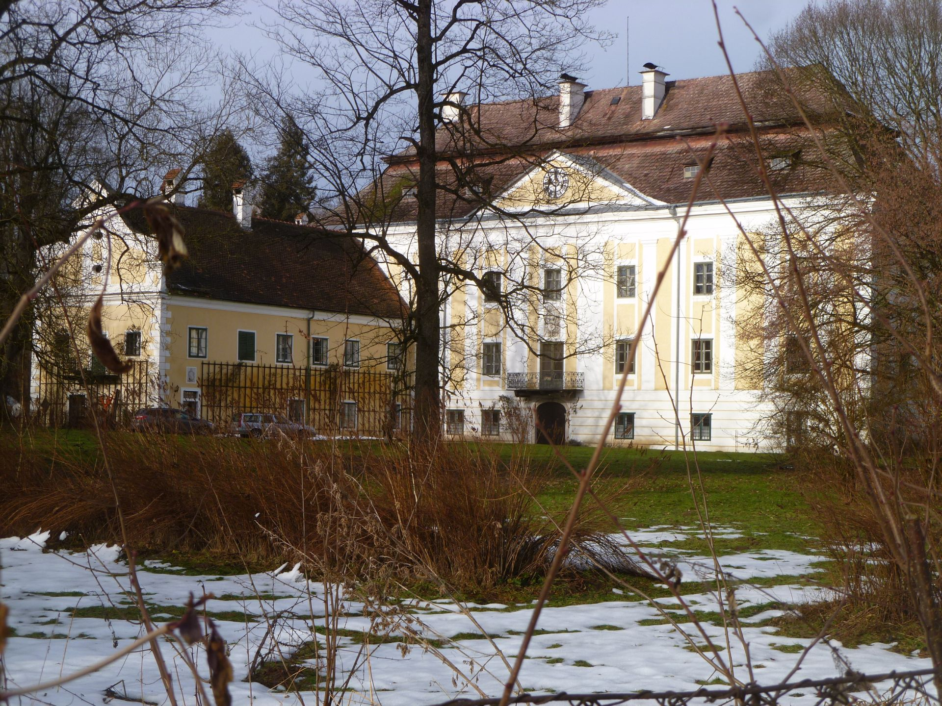 Schloss Walchen (Gesamtansicht)